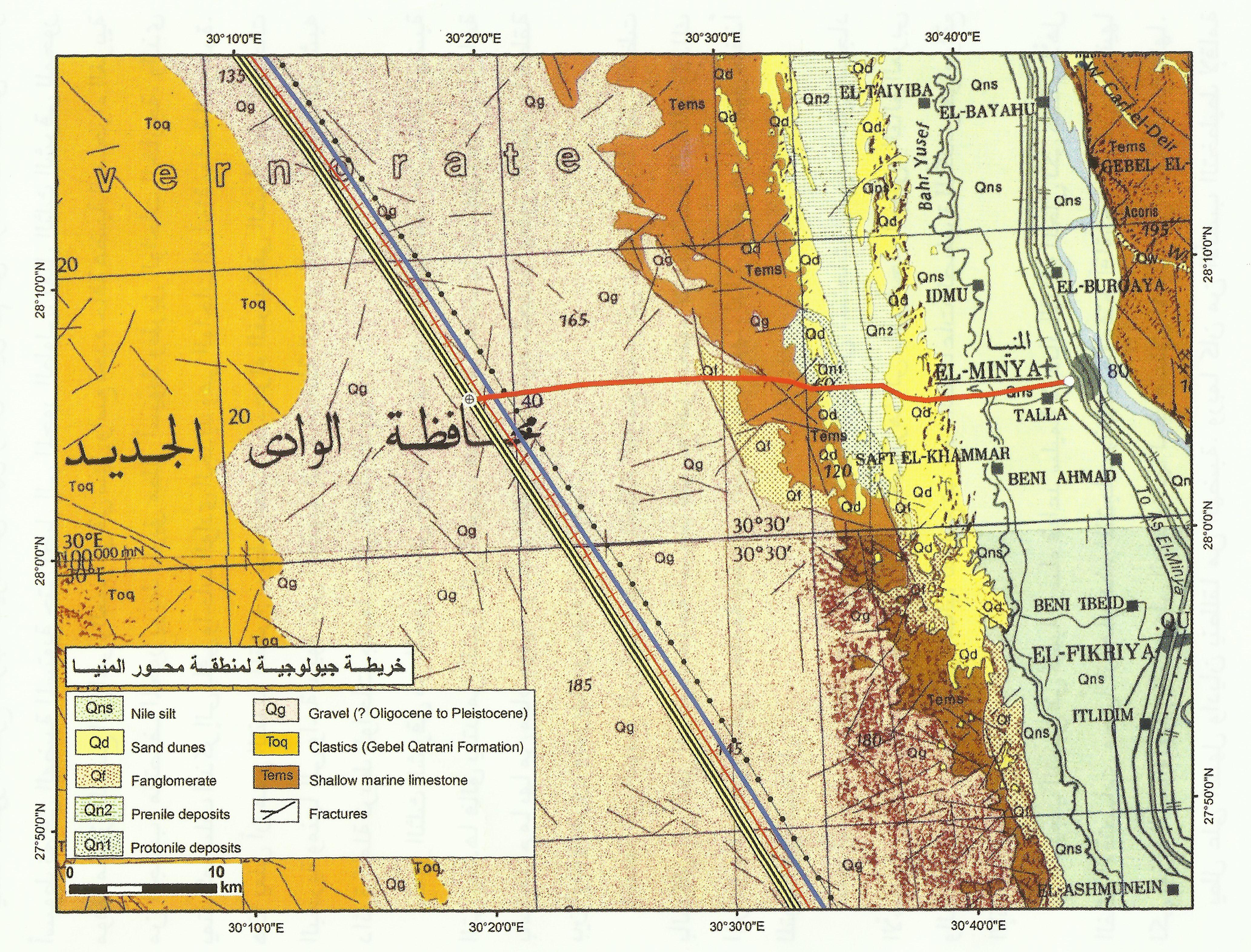 محور تعمير قنا